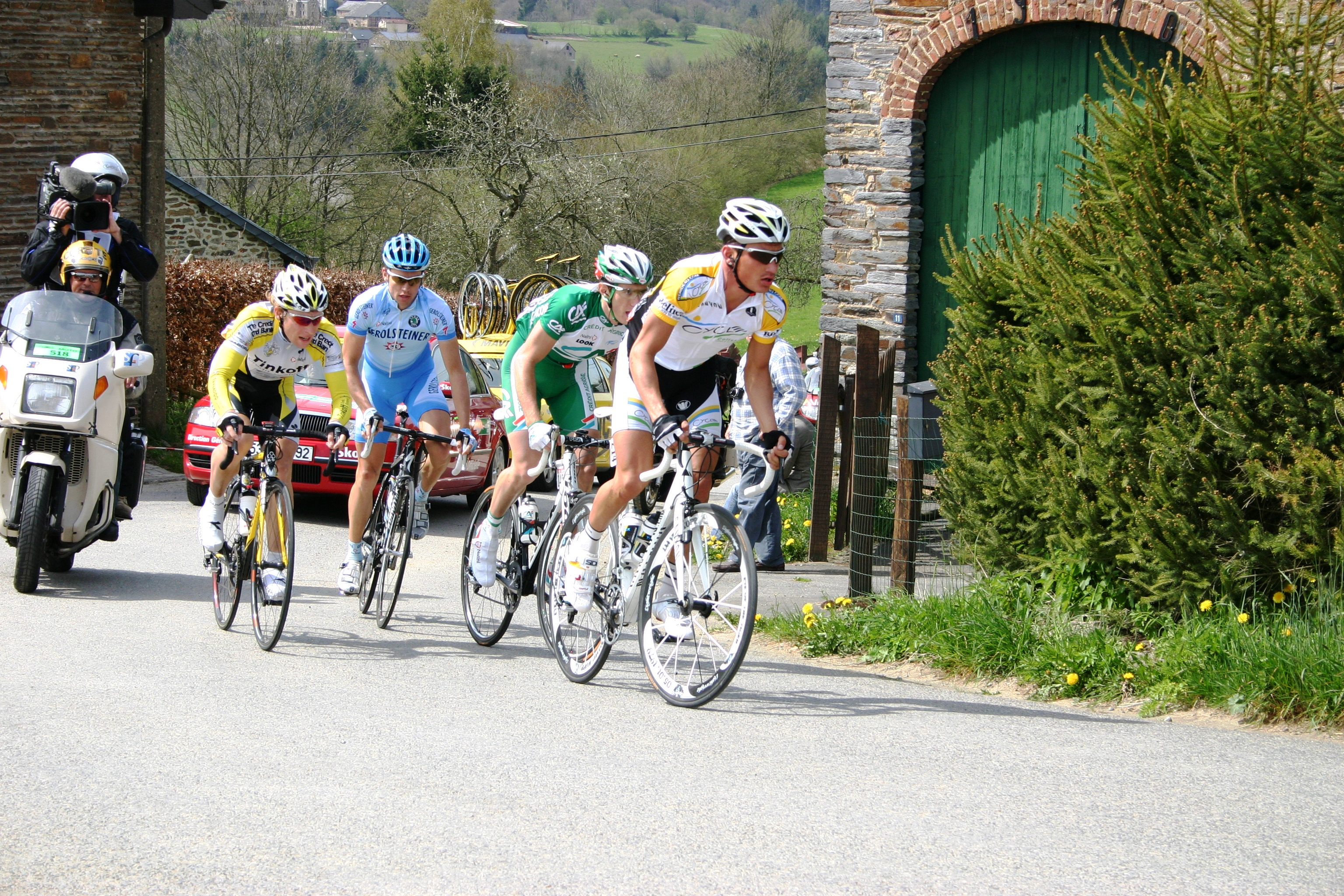 De Pavel Brutt, Markus Fothen, Tom Stubbe a Pierre Roland an der Côte de Wanne um Liège-Bastogne-Liège 2008.